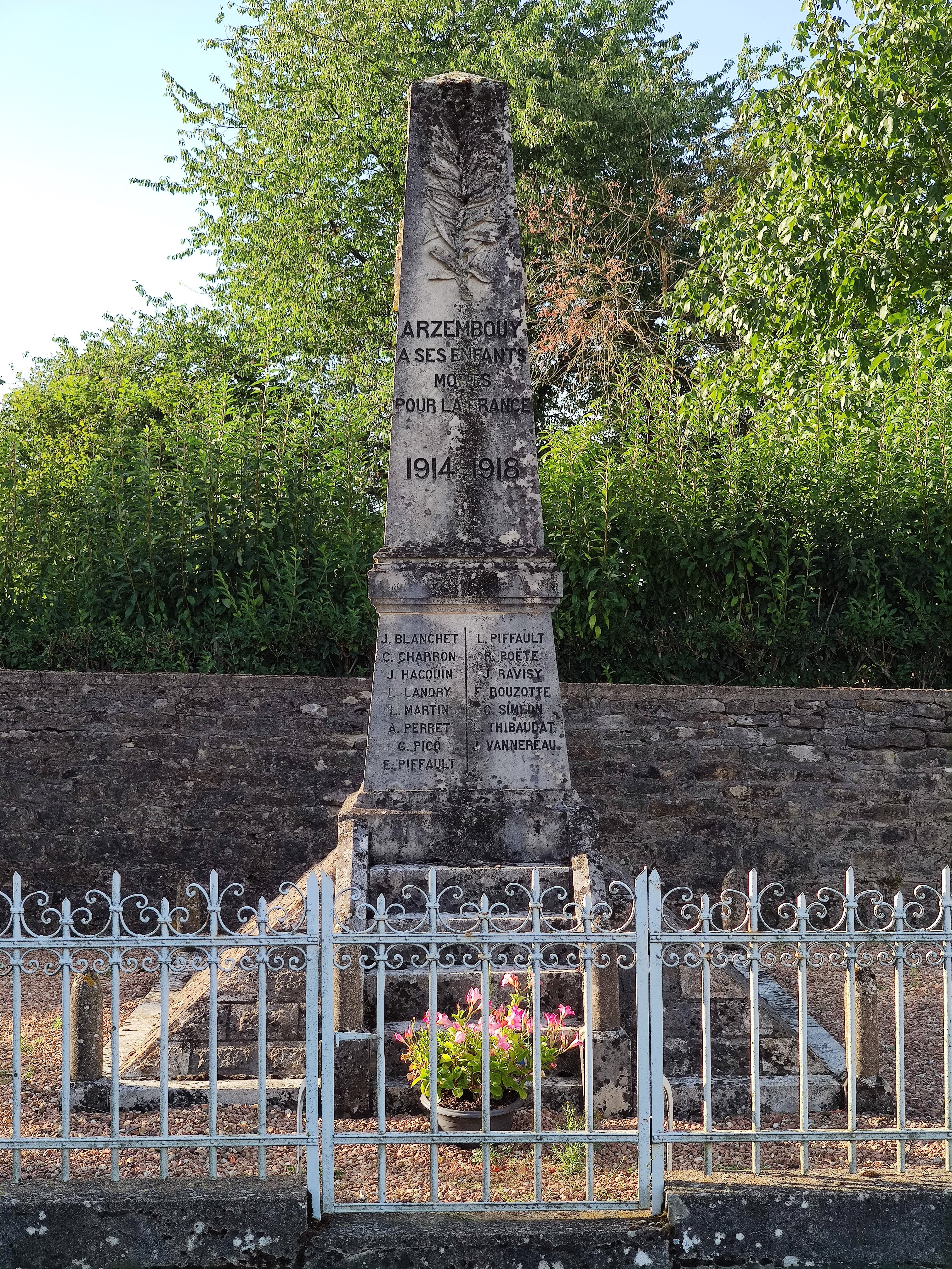 Monument aux morts d'Arzembouy (Nièvre).